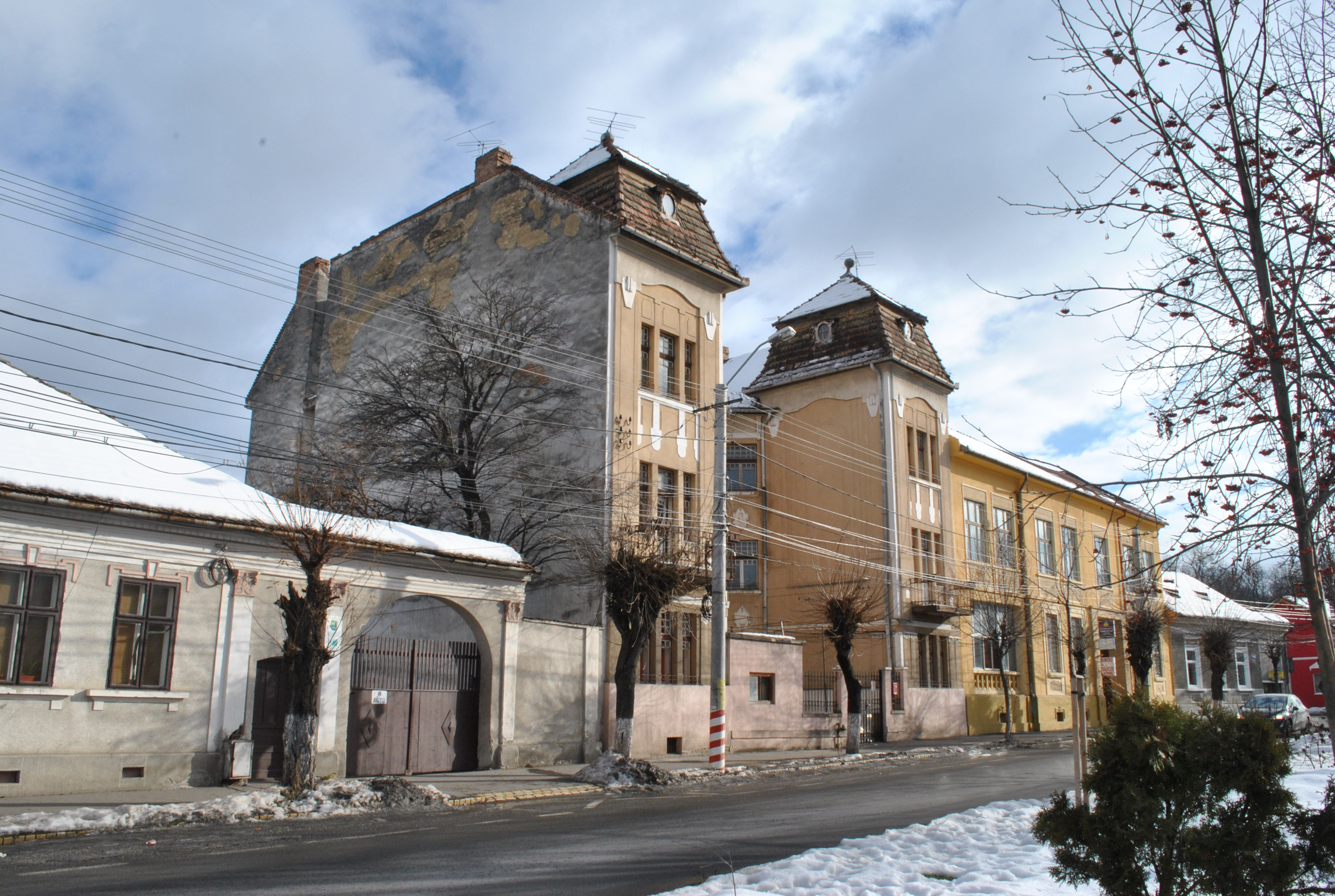 Ansamblul urban Centrul istoric al orașului - zona meșteșugărească